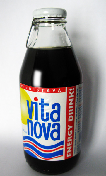 Laihian Mallaksen Vita Nova -energiajuoma